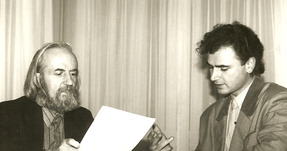 Alek Vukadinović and Dejan Stojanović during the interview in Belgrade, 1990.